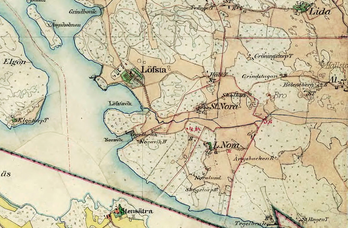 Lövsta gård med omgivning på Häradsekonomiska kartan